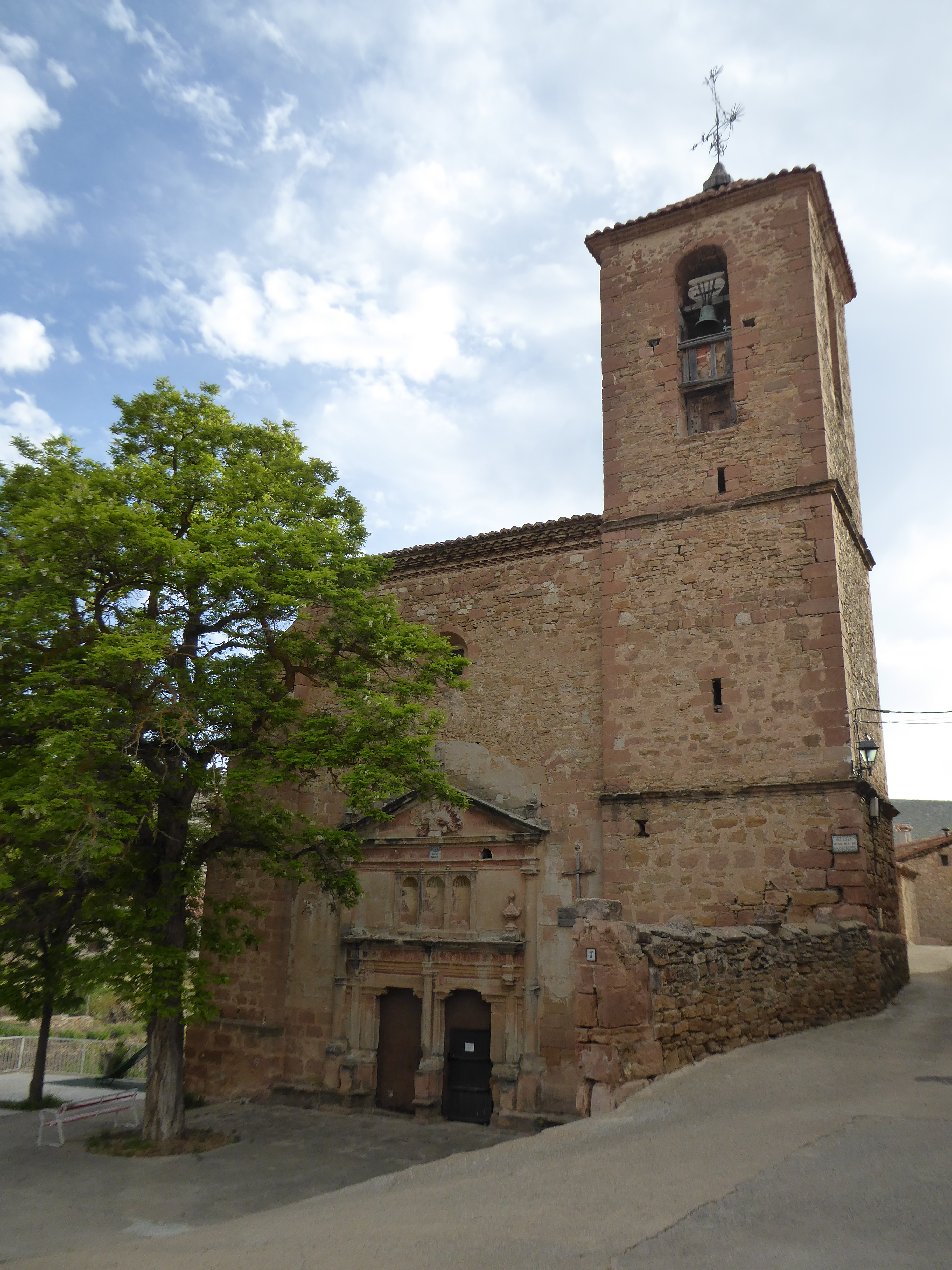 Iglesia de la Asunción en Jorcas